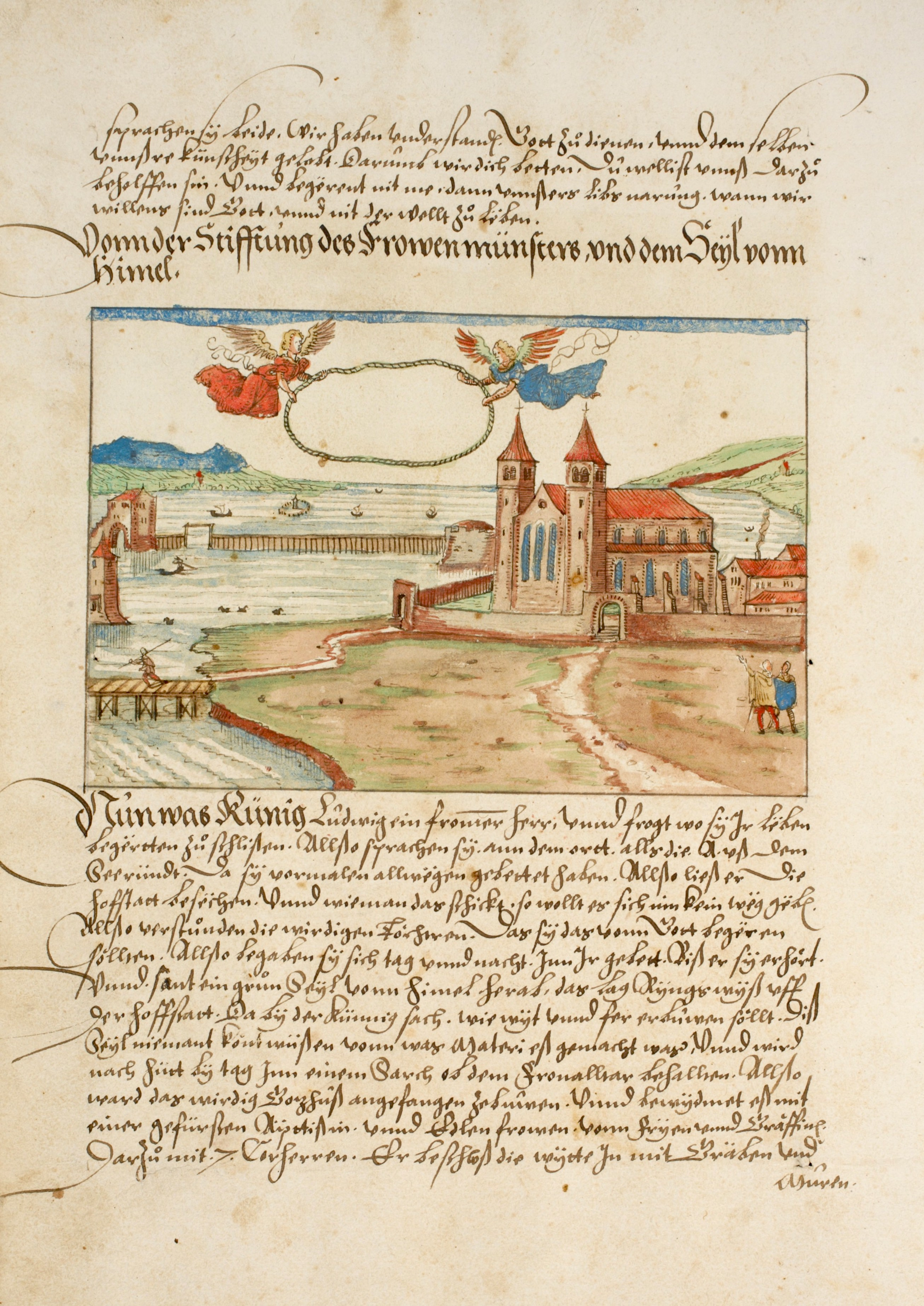 Gründungslegende des Fraumünsters 2. Teil: Das Fraumünster ist umgeben von einer Mauer. Engel halten ein Seil, das den Umfang des Klosters darstellen soll. Links Wellenberg und Grendeltor, rechts Bauschänzli